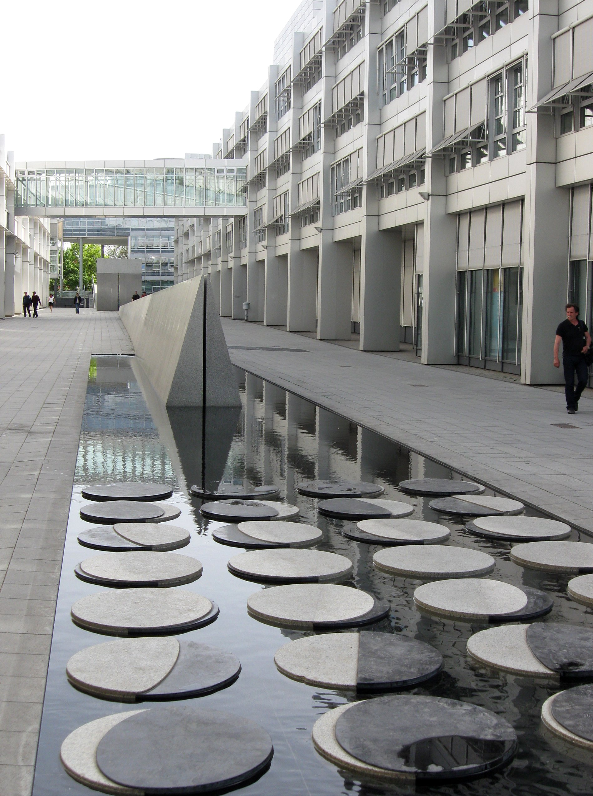 Europäisches Patentamt, Kurt-Haertel-Passage, München. Skulptur Zwischen Sonnentor und Mondplatz von Hannsjörg Voth